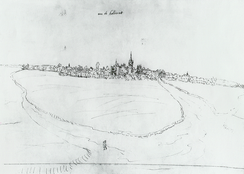 Hülchrath (Orts- und Schlossansicht) von Südosten um 1730